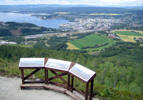 Informasjonstavle av Oftenåsen